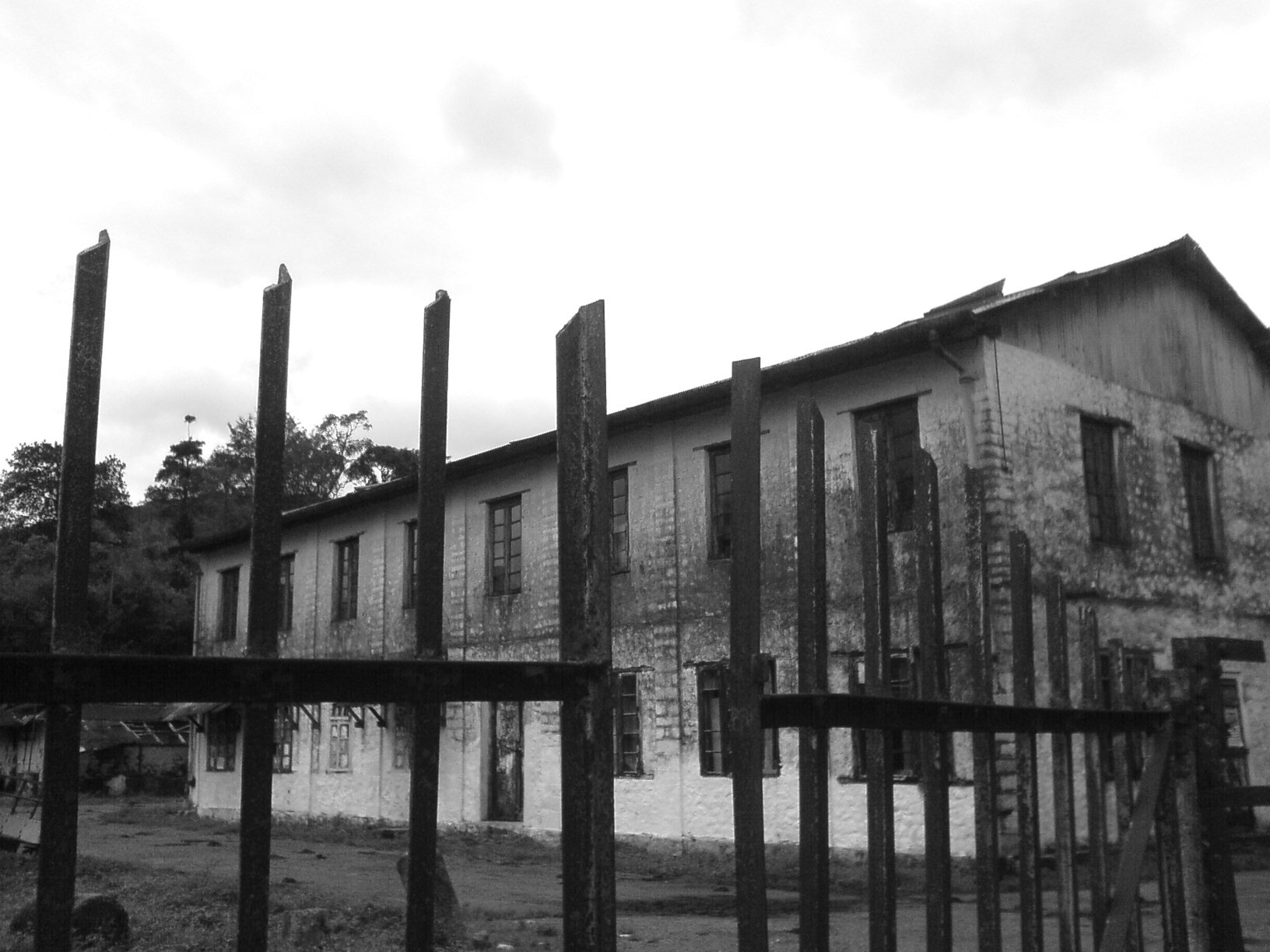 government tea estate, Bonaccord, Trivandrum... they locked it down some time back. ഇവിടെ കുറെ പാവങ്ങള് തൊഴിലില്ലായ്മ കാരണം ആത്മഹത്യ ചെയ്തു എന്ന് കേട്ടിട്ടുണ്ട്. സത്യമാണോ എന്ന് അറിയില്ല. എന്തായാലും അവിടുത്തെ സ്ഥിതി വളരെ കഷ്ടമാനു. these all are from my old archives, when i used to roam around with my mobile cam. Sony Ericsson k750i.